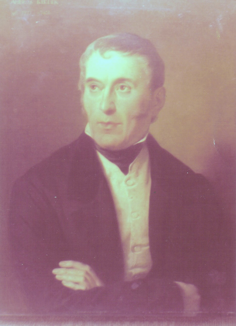 Ambros Rieder, porträtiert von seinem Sohn Wilhelm August Rieder